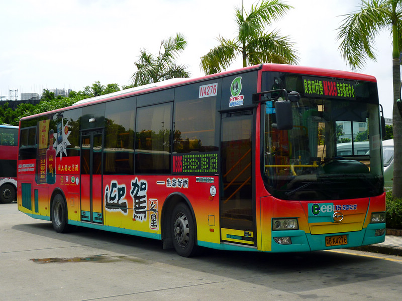 中文（中国大陆）: 深圳公交M385路的五洲龙FDG6111HEVG2